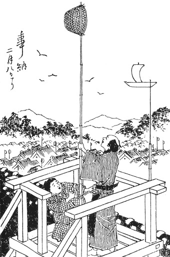 Kotoosame (事納め) from the Onko-nenjūgyōji (温古年中行事)